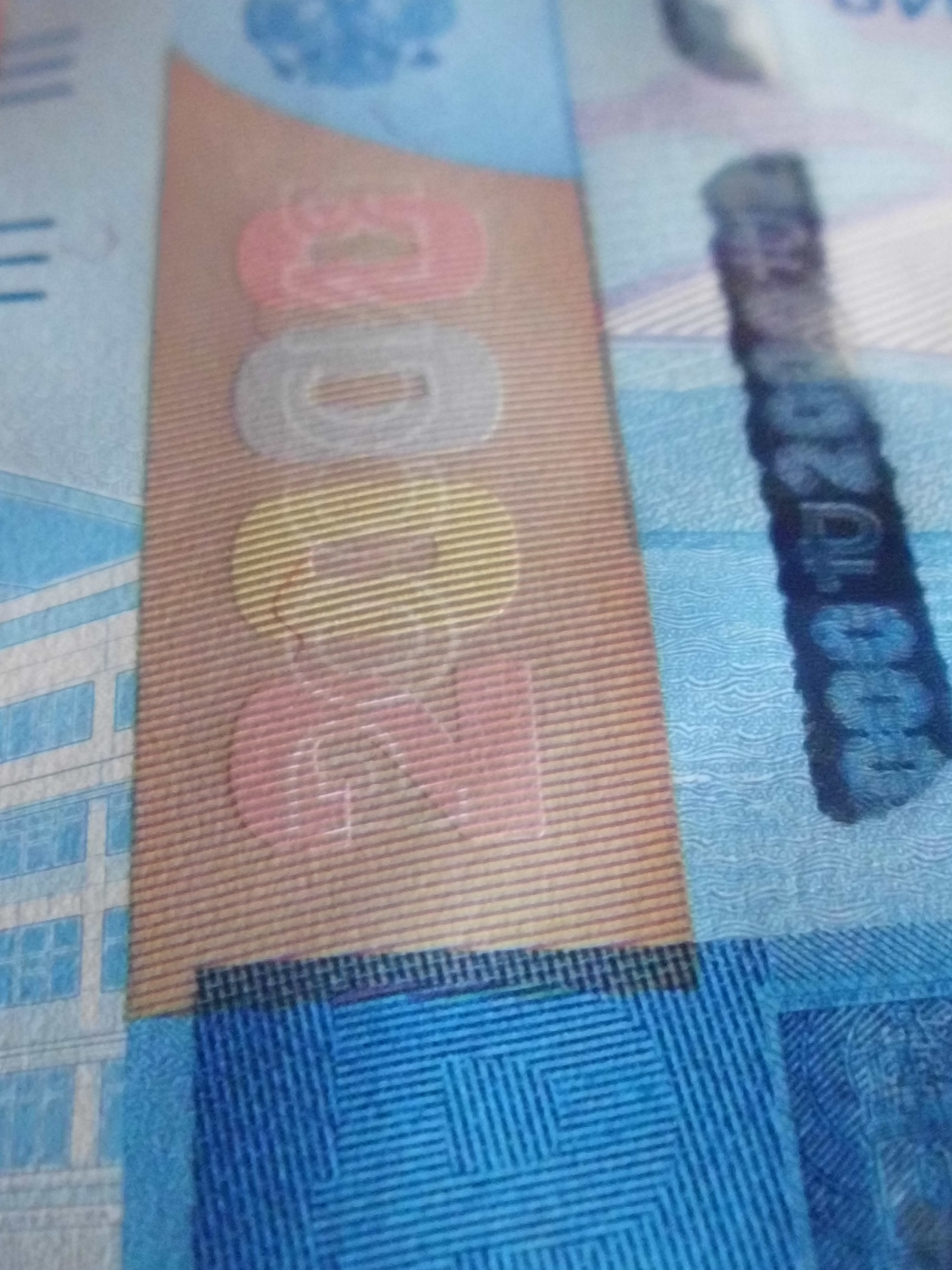 2000 российских рублей образца 2017 года. Аверс. Цветопеременное число 2000, контурная надпись "РОССИЯ" на заштрихованном флюоресцирующем поле с левой стороны банкноты. Вид с нижней стороны банкноты.